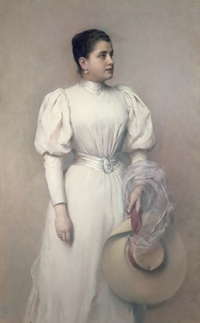 Marie Renard (1864–1939), Austrian operatic mezzo-soprano